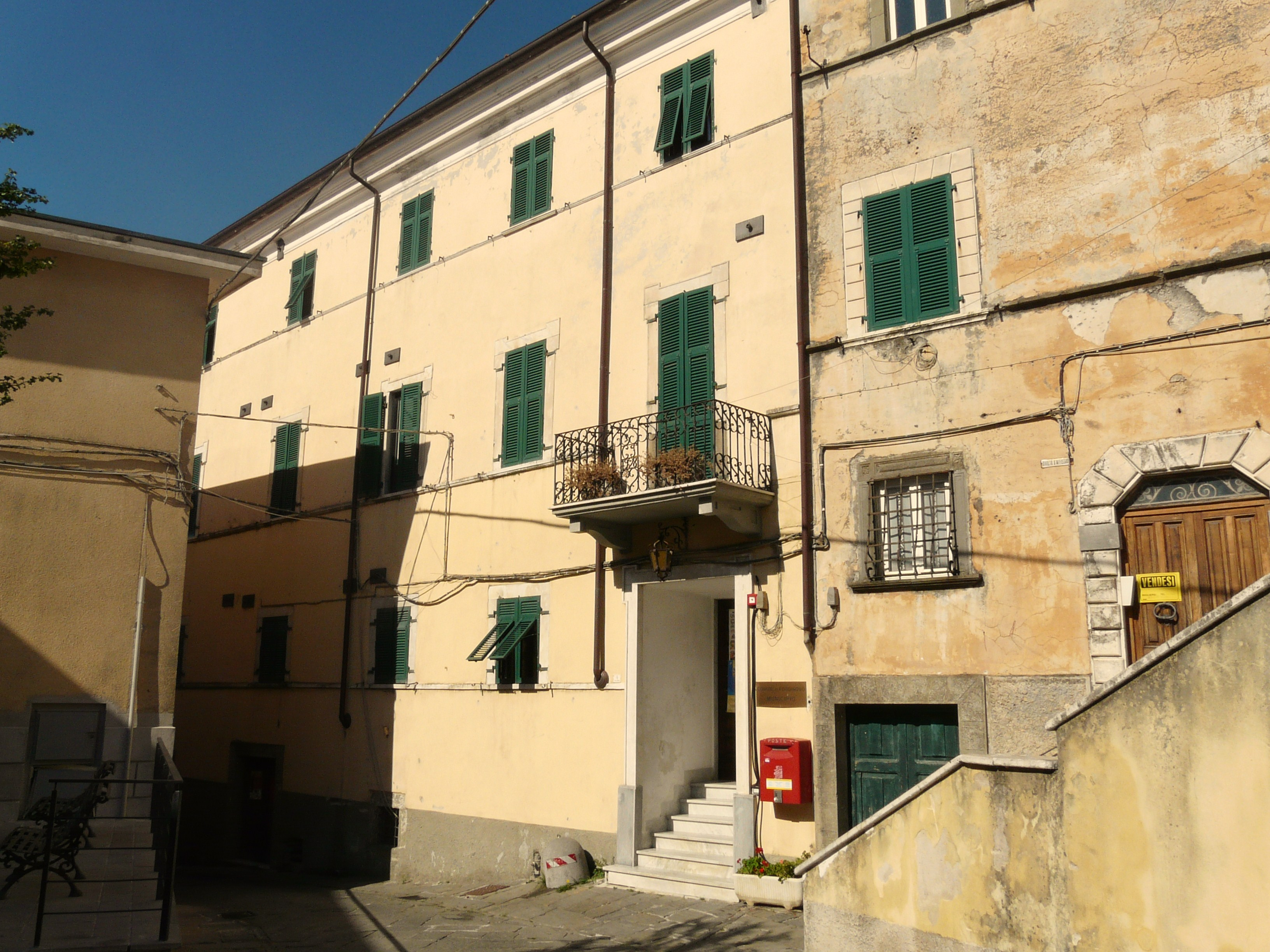 Municipio di Fosdinovo, Toscana, Italia